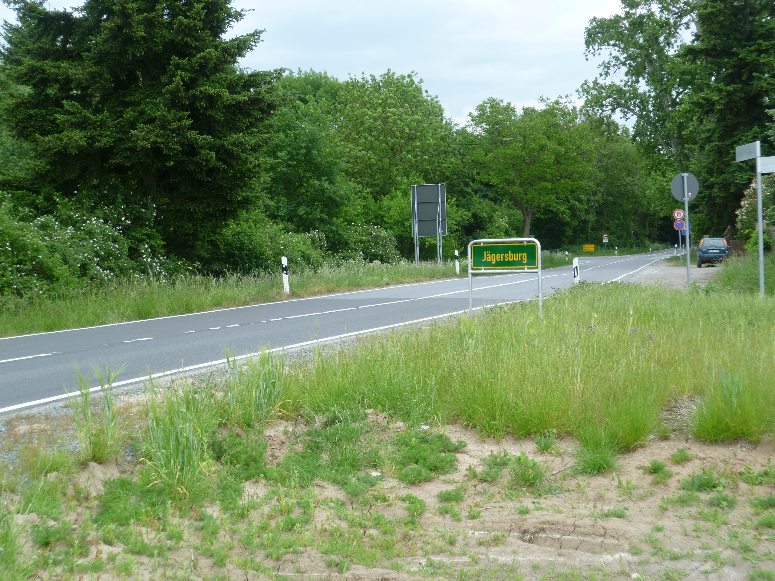 Landesstrasse L3111 mit dem Weilerschild Jägersburg. Auf der linken Seite der Straße die Stelle, an der das Neue Jagdschloss Jägersburg 1713 erbaut wurde. Rechts (nicht im Bild) das Forsthaus der Revierförsterei Jägersburg. Standort Gemarkung Groß-Rohrheim mit Blick auf die Gemarkung Einhausen.